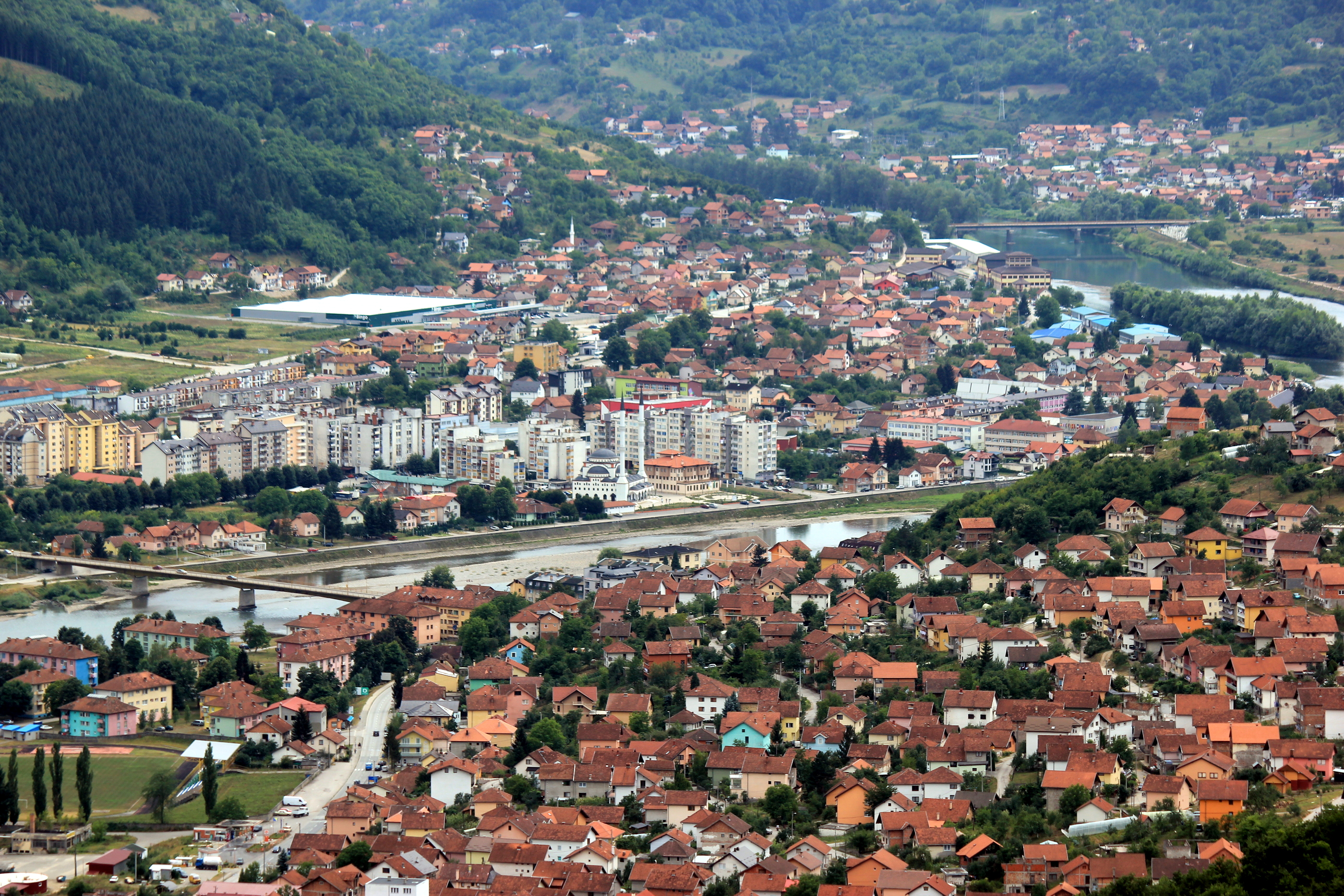 Blick über Goražde, Bosnien und Herzegowina.